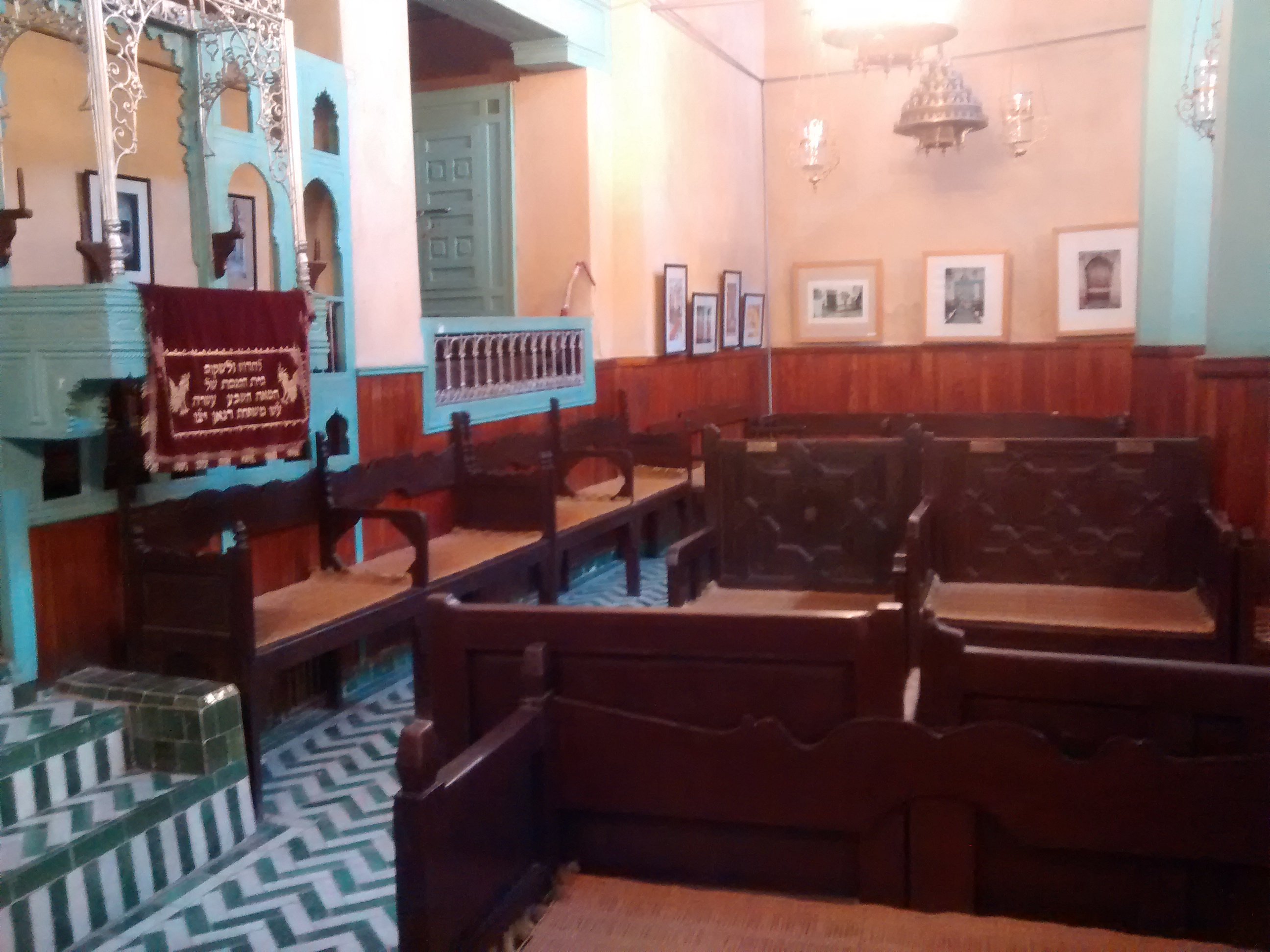 Ibn Danan Synagogue in Fez, Morocco.